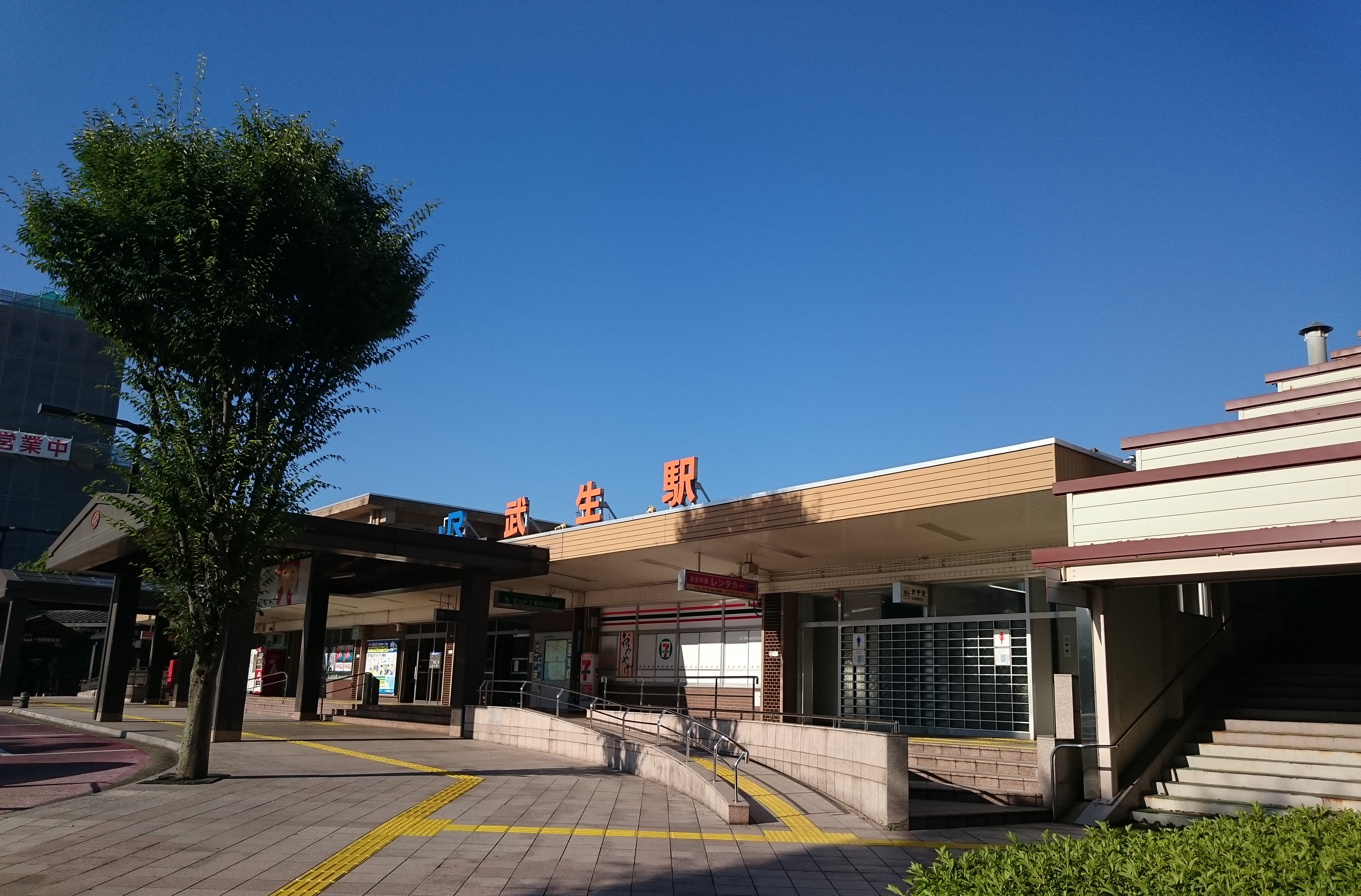 武生駅の外観 Sony Xperia Z3